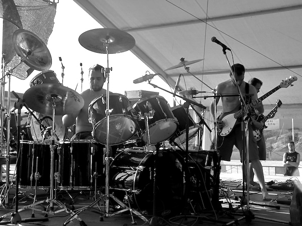 Pelican performing live. 04.08 Sant Feliu Fest 2004 Sant feliu de guixols, girona